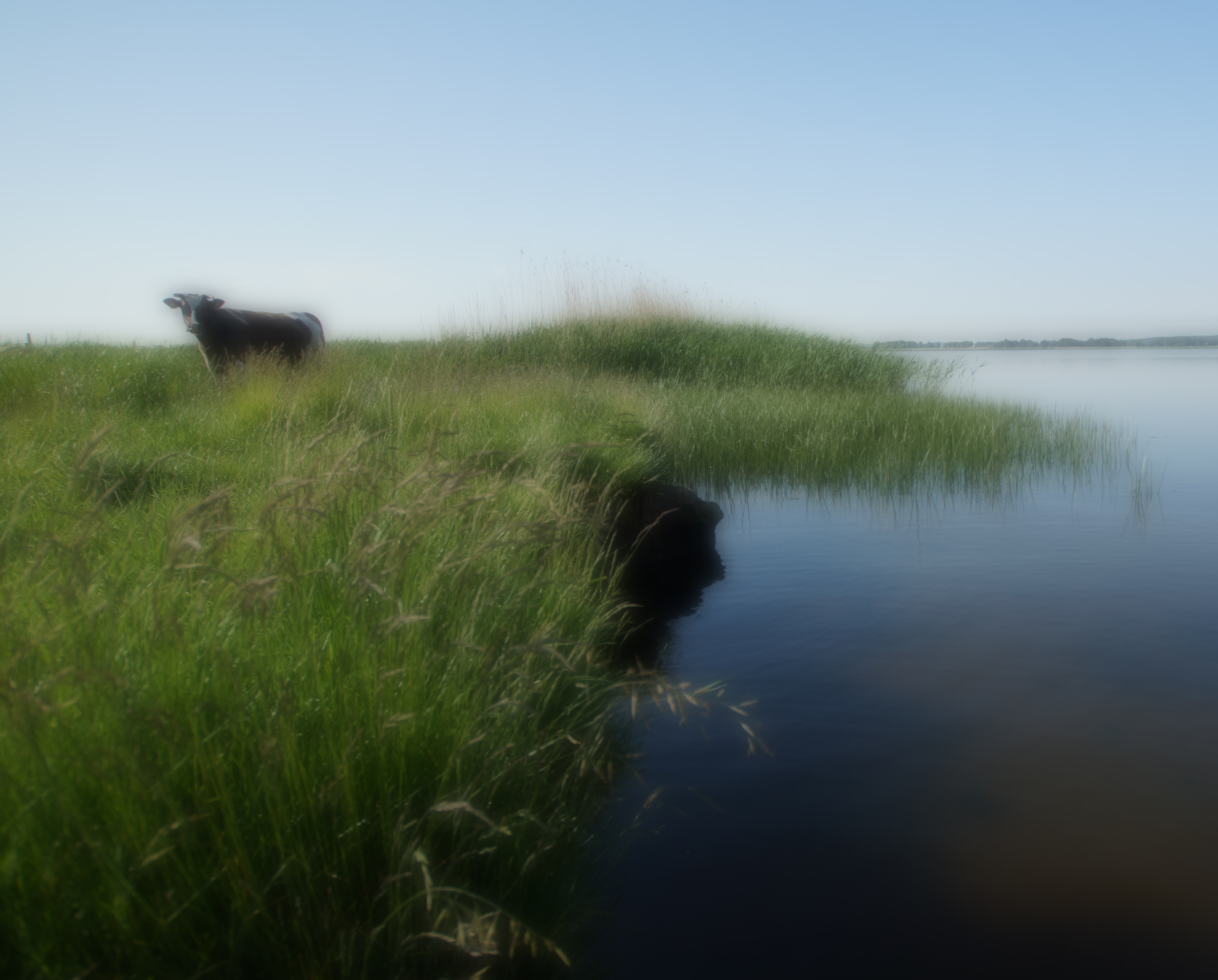 Himmel-Koen, Randers Fjord